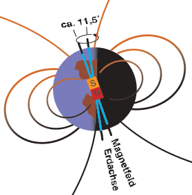 Darstellung des Erdmagnetfeldes